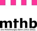 Logo Mittelthurgaubahn